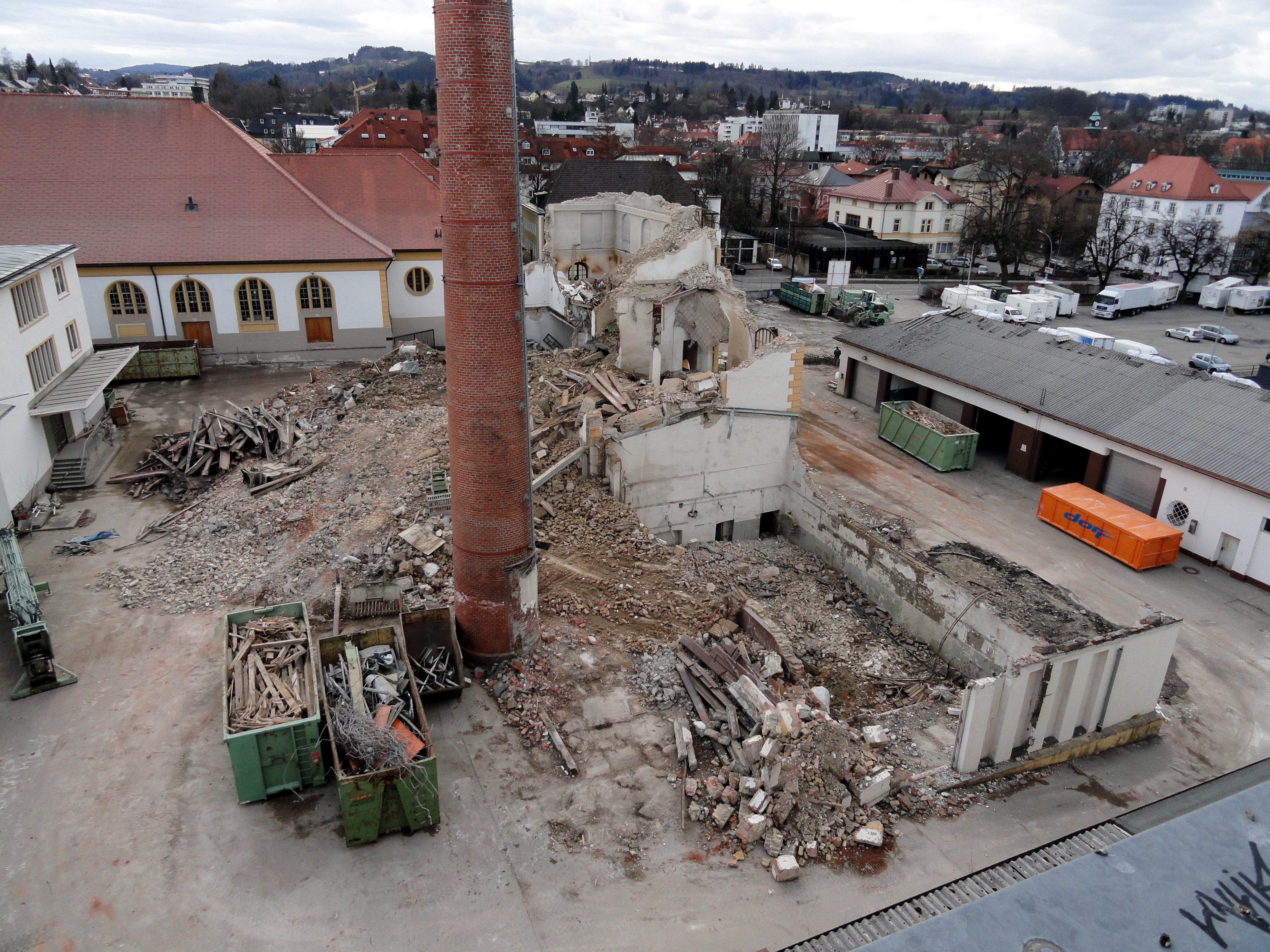 Abriss des Sudhauses im April 2013 - genaues Datum (und grobe Uhrzeit) der fortgeschrittenen Abbrucharbeiten unter "Datum" genannt